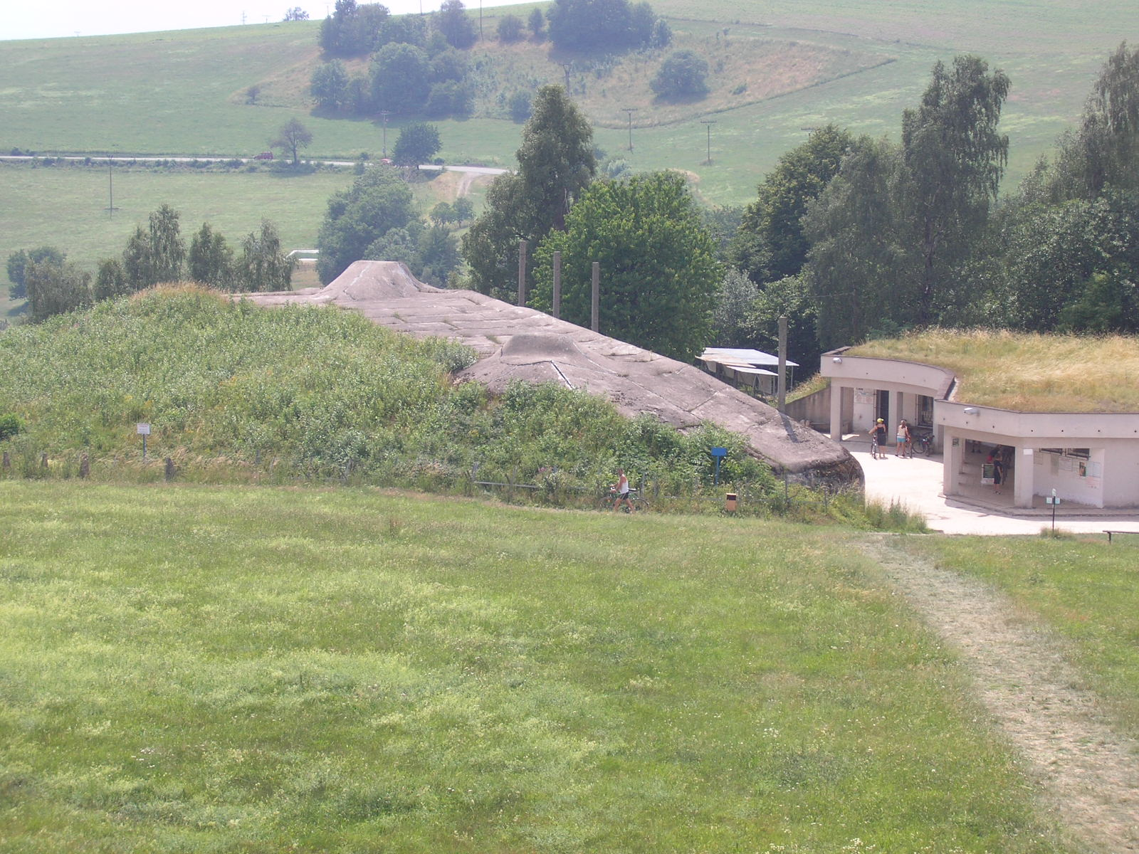 Dělostřelecký srub N-S 75 tvrze Dobrošov a budova muzea